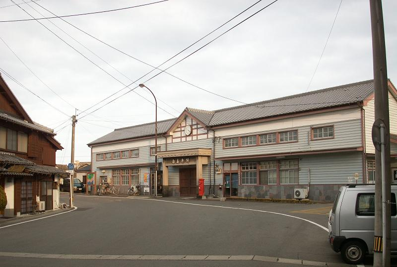 （2007年1月、投稿者Jnr bus撮影）